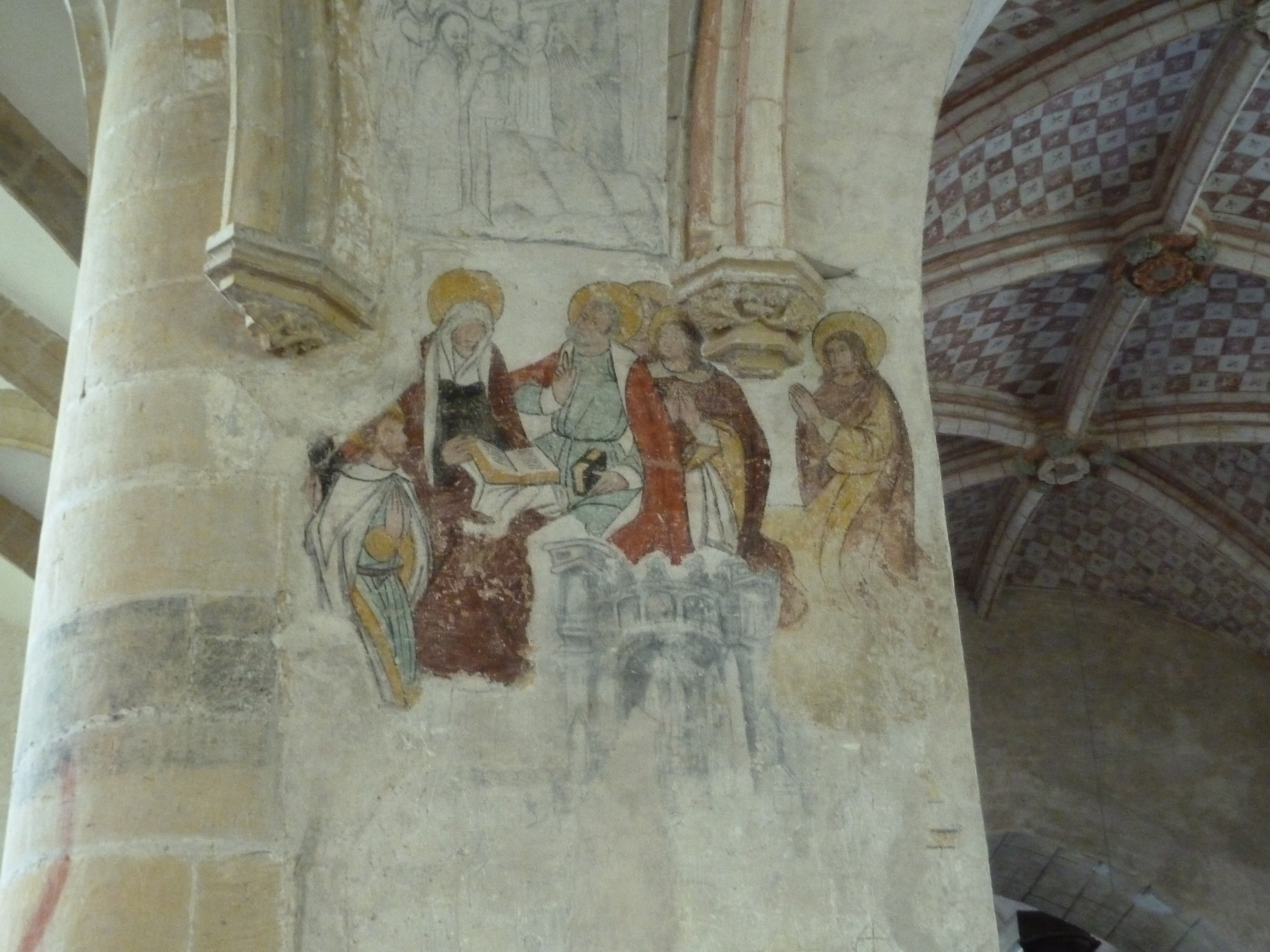 L'église Saint-Léger est l'une des trois églises de la commune de Monthermé et est dédiée à Saint-Léger , ici la fresque La Vierge au milieu des Apôtres.